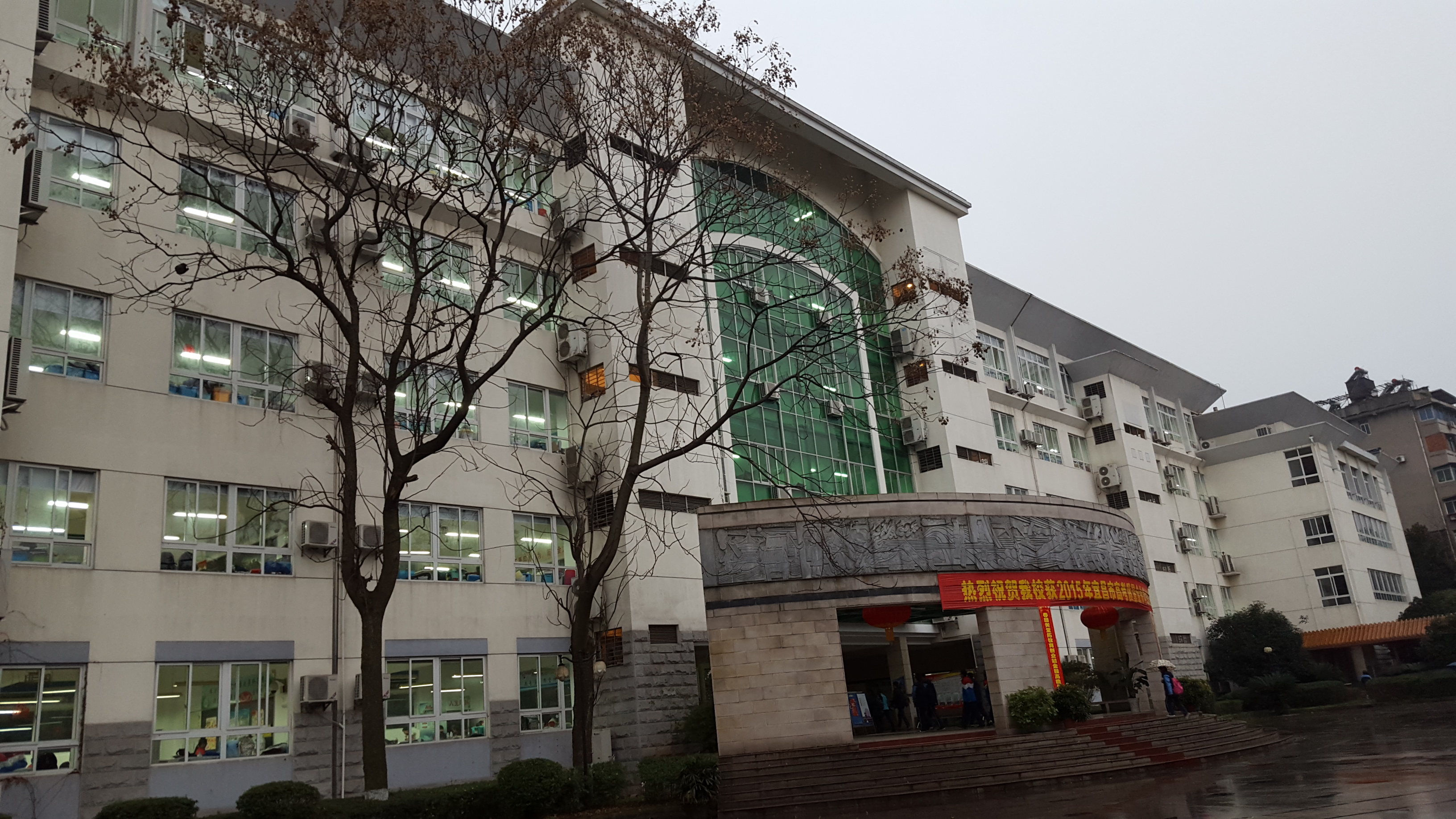 宜昌市第一中学教学楼